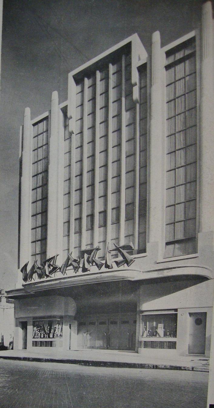 Fachada del Teatro y Dancing "Tabaris", en Avenida Corrientes 829. Remodelado en 1937 por el arquitecto Rafael Sammartino. Buenos Aires, Argentina.